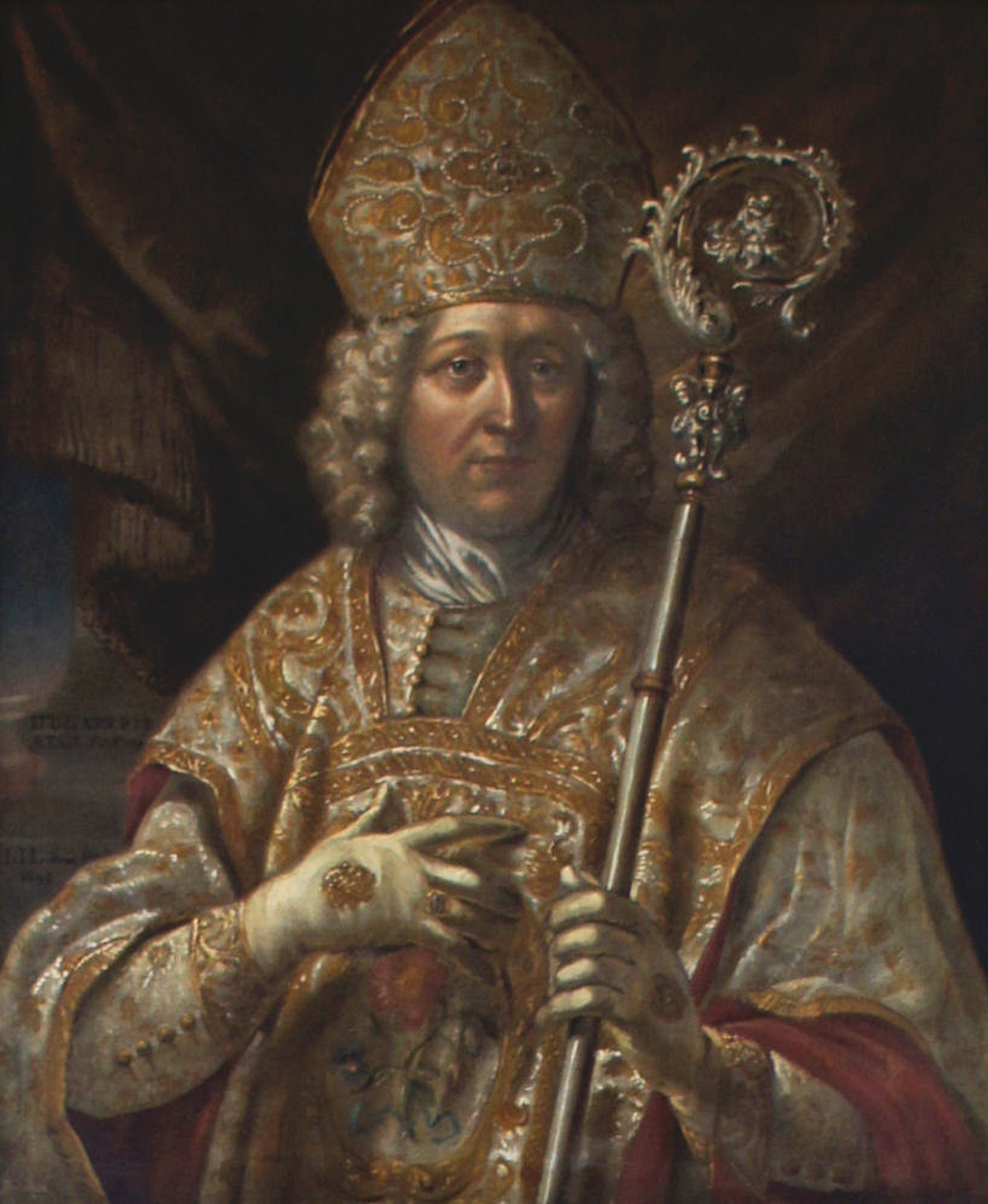 Porträtgemälde von Johann Franz Eckher von Kapfing und Liechteneck, Fürstbischof von Freising, im Fürstengang zwischen Fürstbischöflicher Residenz und Freisinger Dom.